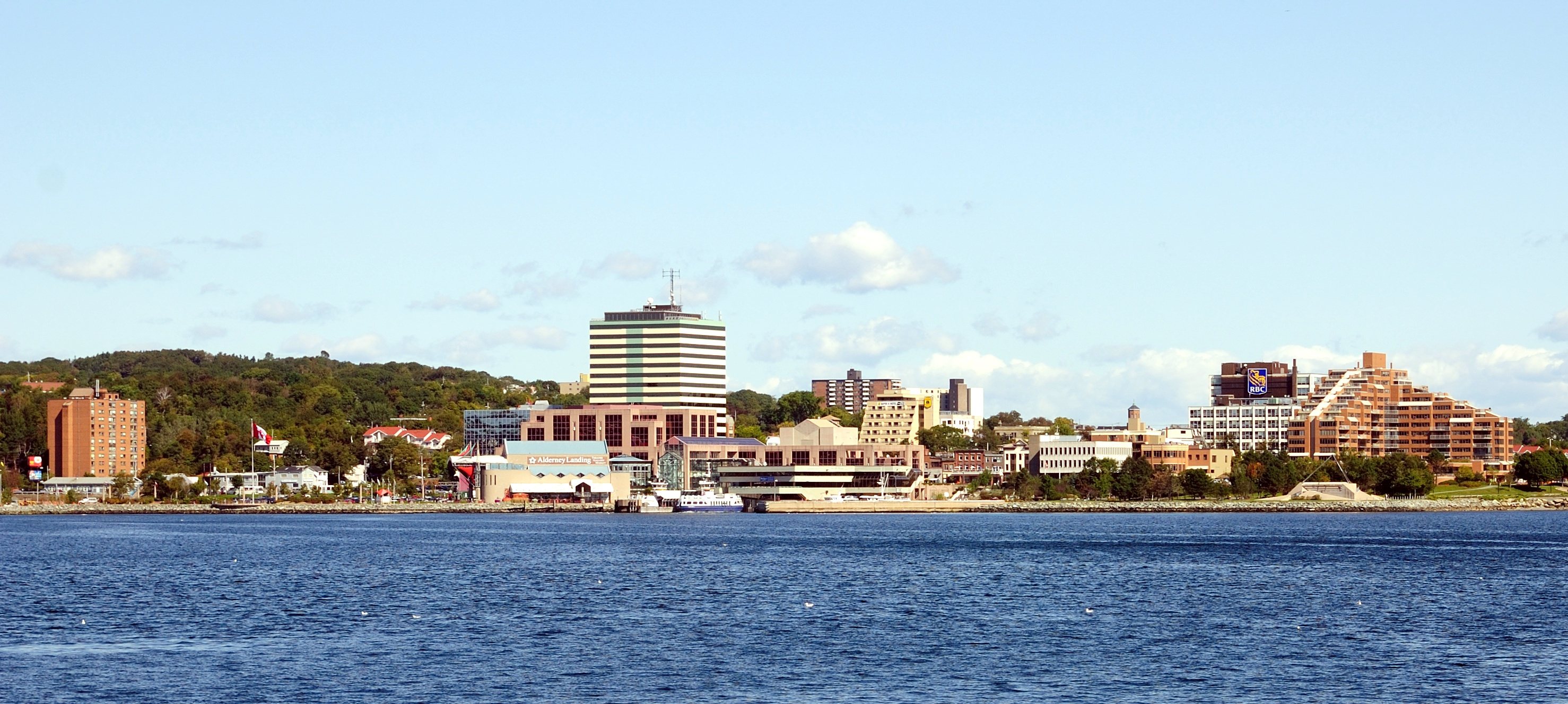 Blick auf Darmouth von Halifax